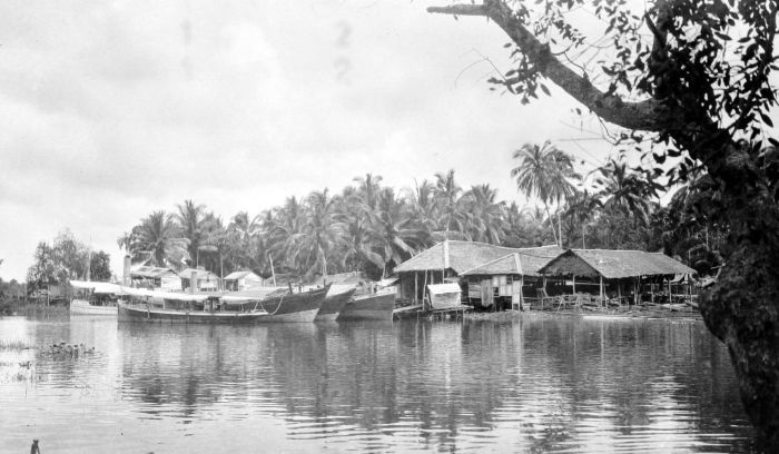 Negatief. Sleepboten met zeesleeptongkangs, vermoedelijk te Teloekniboeng, Asahan, Oost-Sumatra